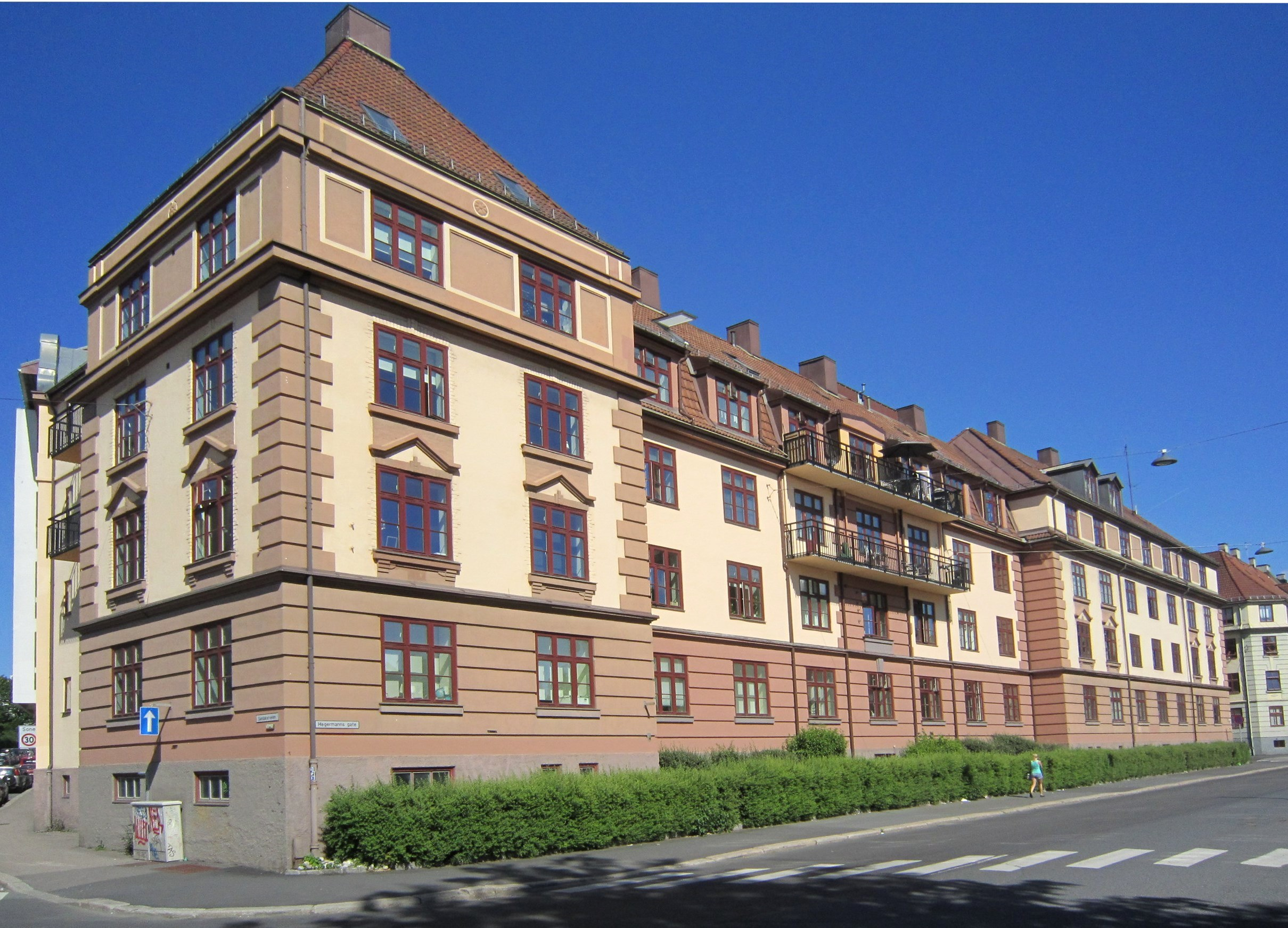 Hegermanns gate på Torshov i Oslo